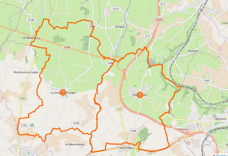 Carte de la commune nouvelle et ses communes déléguées